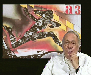 Portrait de Gianni Bertini